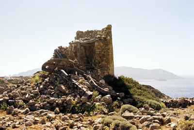 Titel: Ruïne van een molen (Milos op achtergrond) Locatie: Kimolos, Griekenland Datum: juni 2004 Fotograaf: Gebruiker:IMFJ